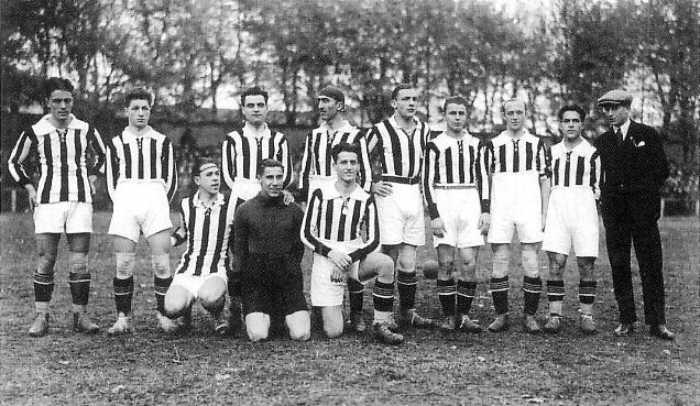 Una formazione della Juventus nella stagione 1925-26.